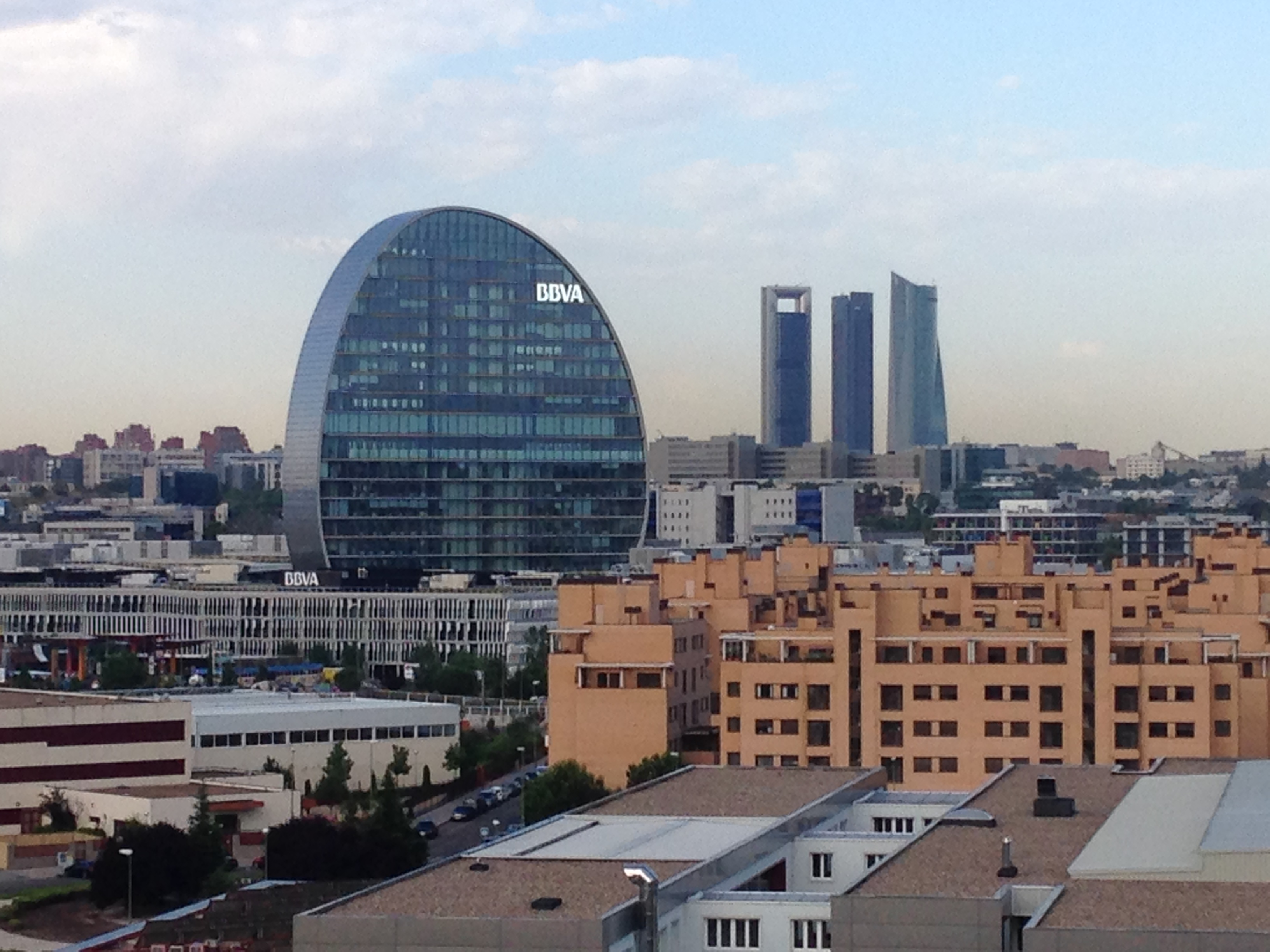 Edificio La Vela, Las Tablas, Madrid, España